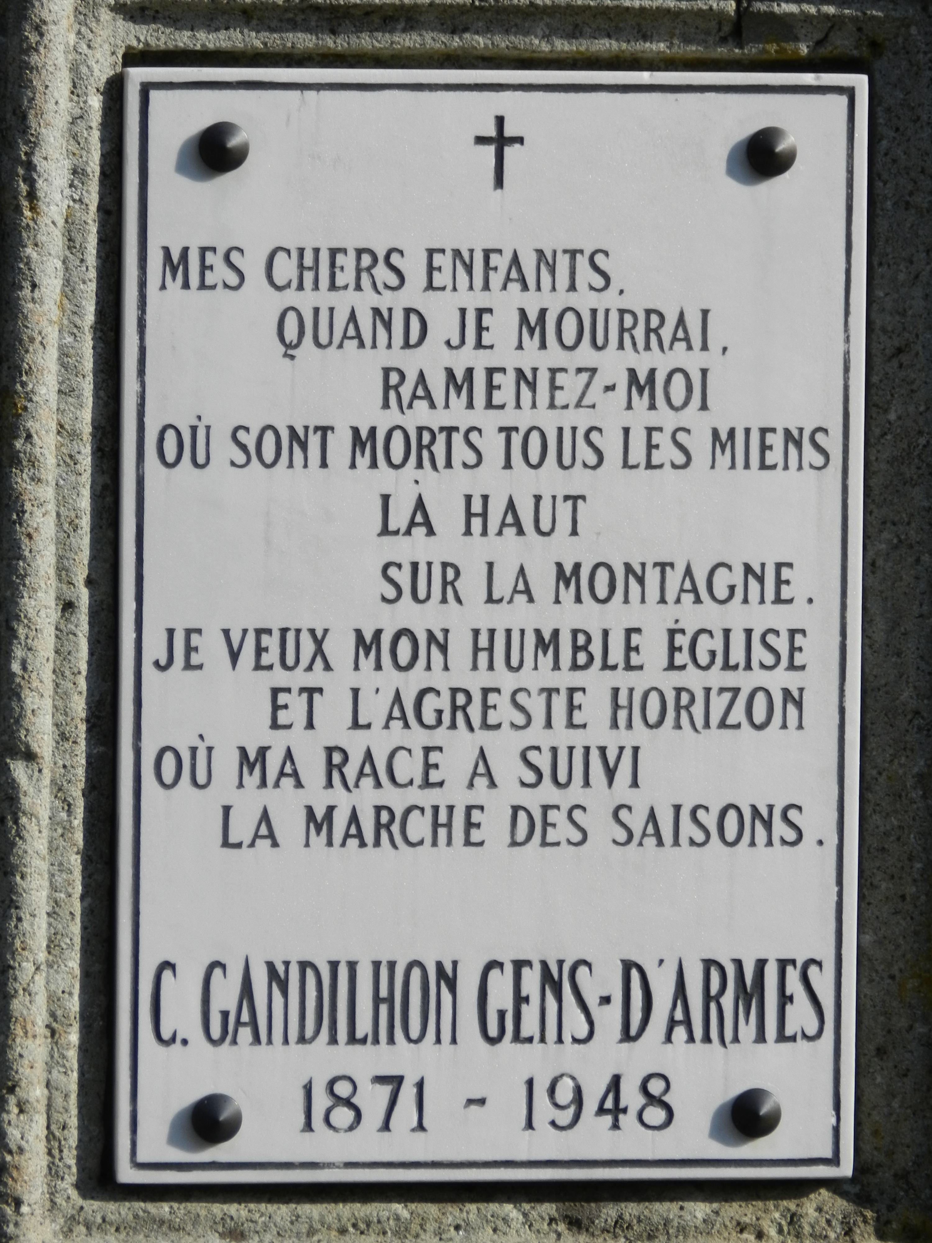 La plaque est apposée dans à l'entrée du cimetière de Lavigerie sur la tombe de Camille Gandilhon Gens d'Armes. Il y a d'écrit les derniers mots du poète.